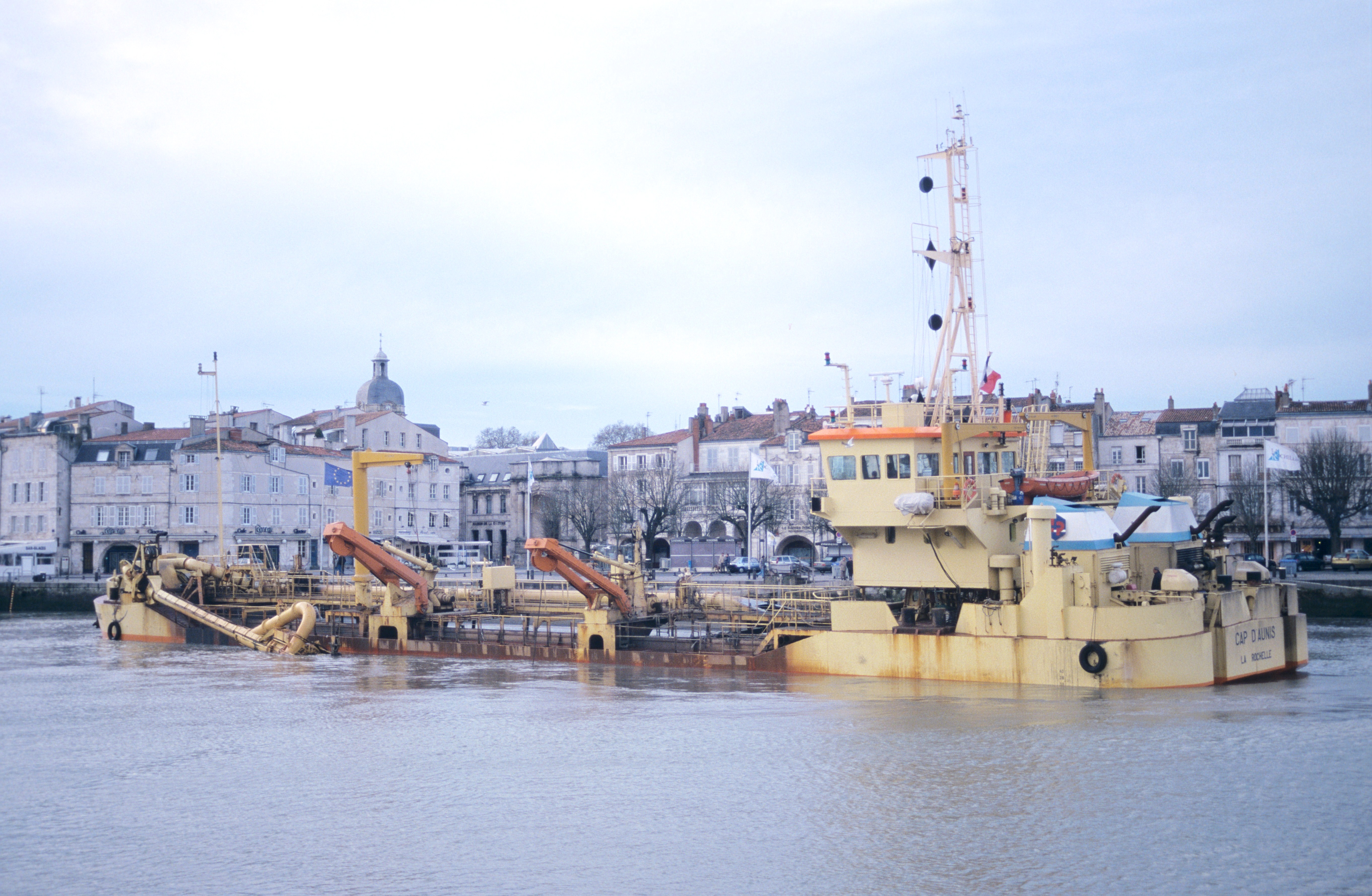 La drague aspiratrice en marche ouvrante « Cap d’Aunis » effectuant son passage de dévasement dans le Bassin d’Échouage. La Rochelle, Charente-Maritime, France.